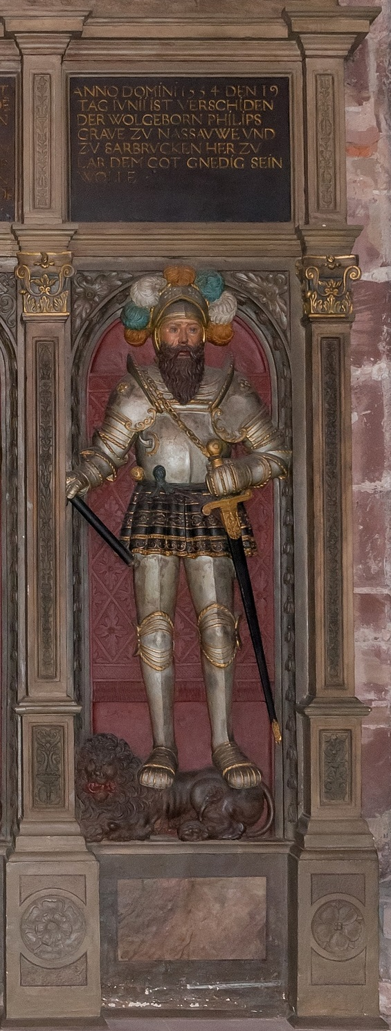 Grafmonument voor Filips III van Nassau-Saarbrücken in de Stiftskirche Sankt Arnual